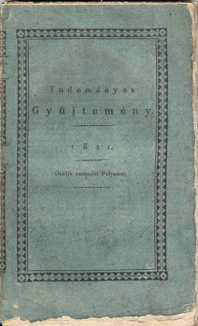 Tudományos Gyüjtemény címlapja, 1821